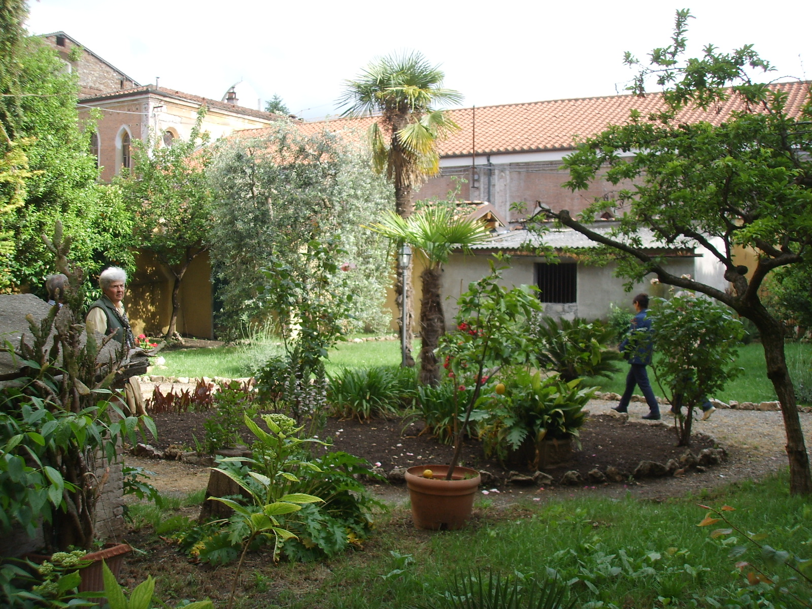 Palazzo della Magione del Tempio. giardino 02.JPG